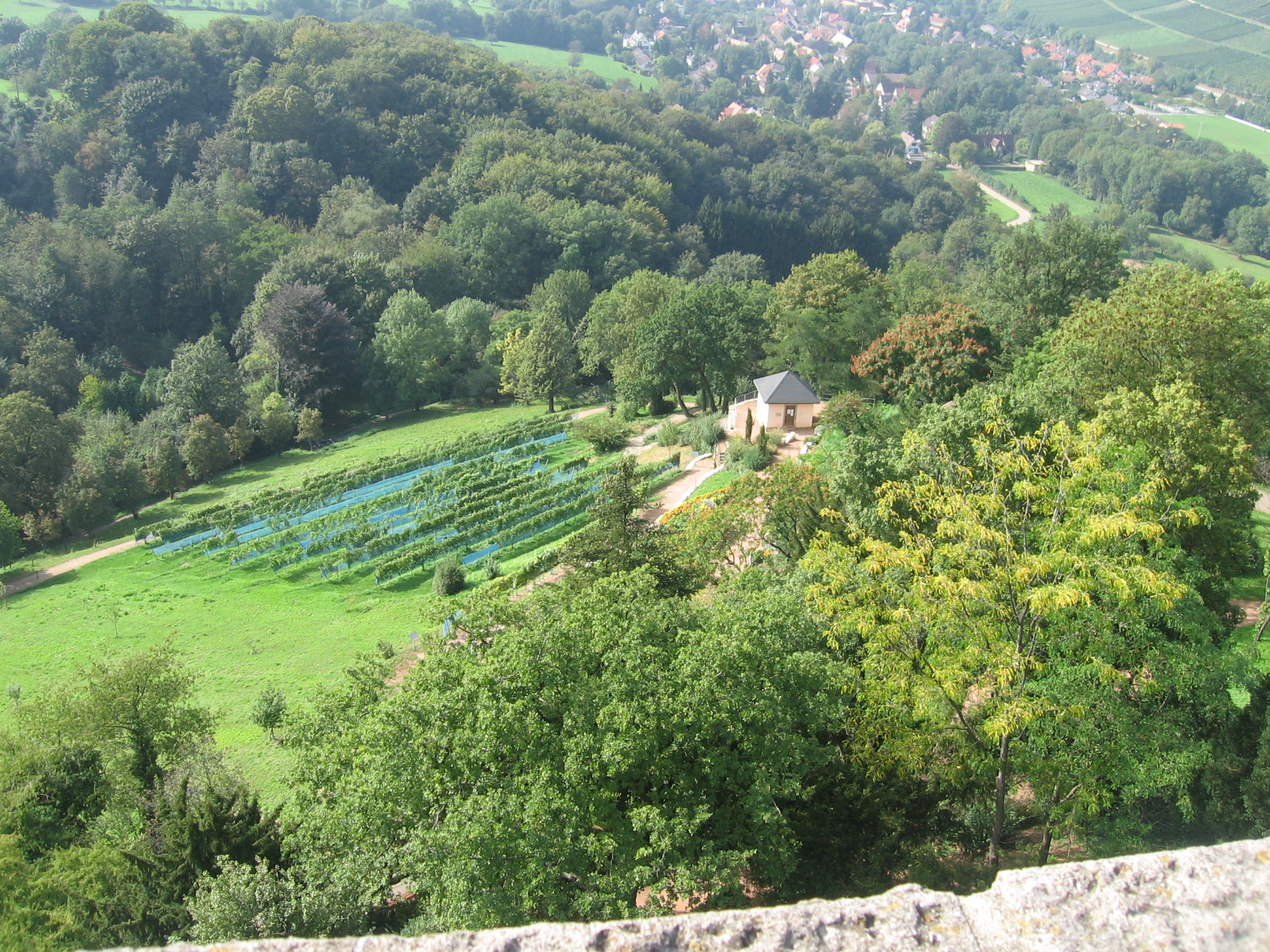 Rebenbotanischer Schaugarten und Teil des Kurparks, Roadytom, selbstfotografiert